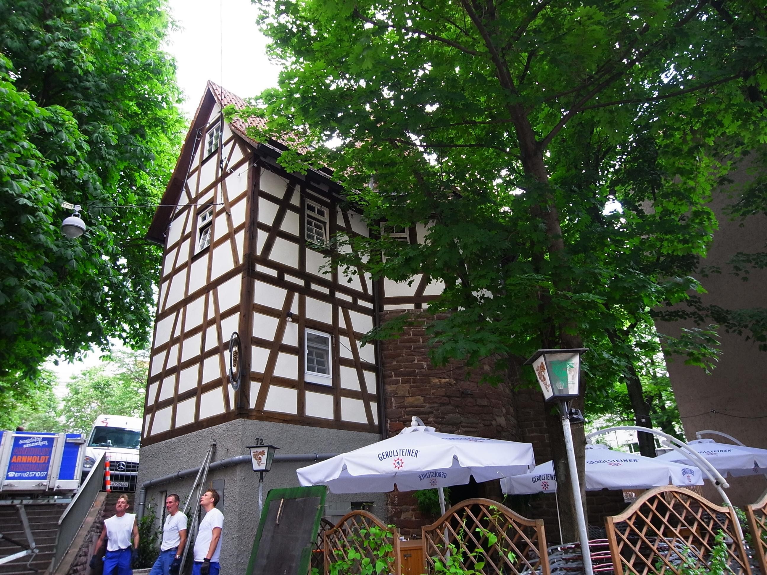 Schellenturm (Blick aus der Wagnerstraße) Stuttgart